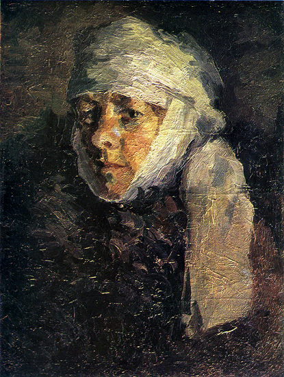 Жанчына ў намітцы